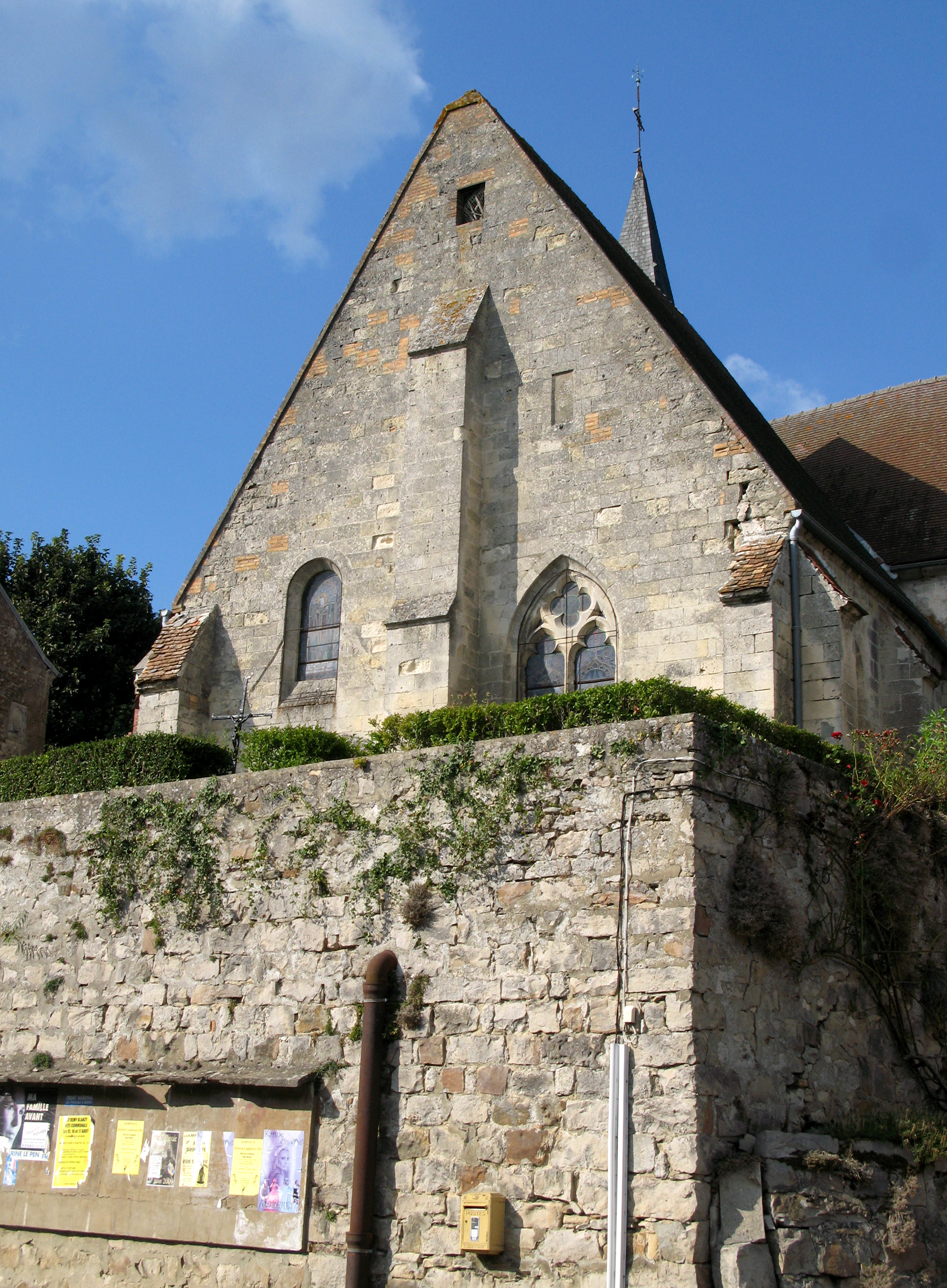 Dampleux (Aisne, France) - L'église Saint-Leu. . .